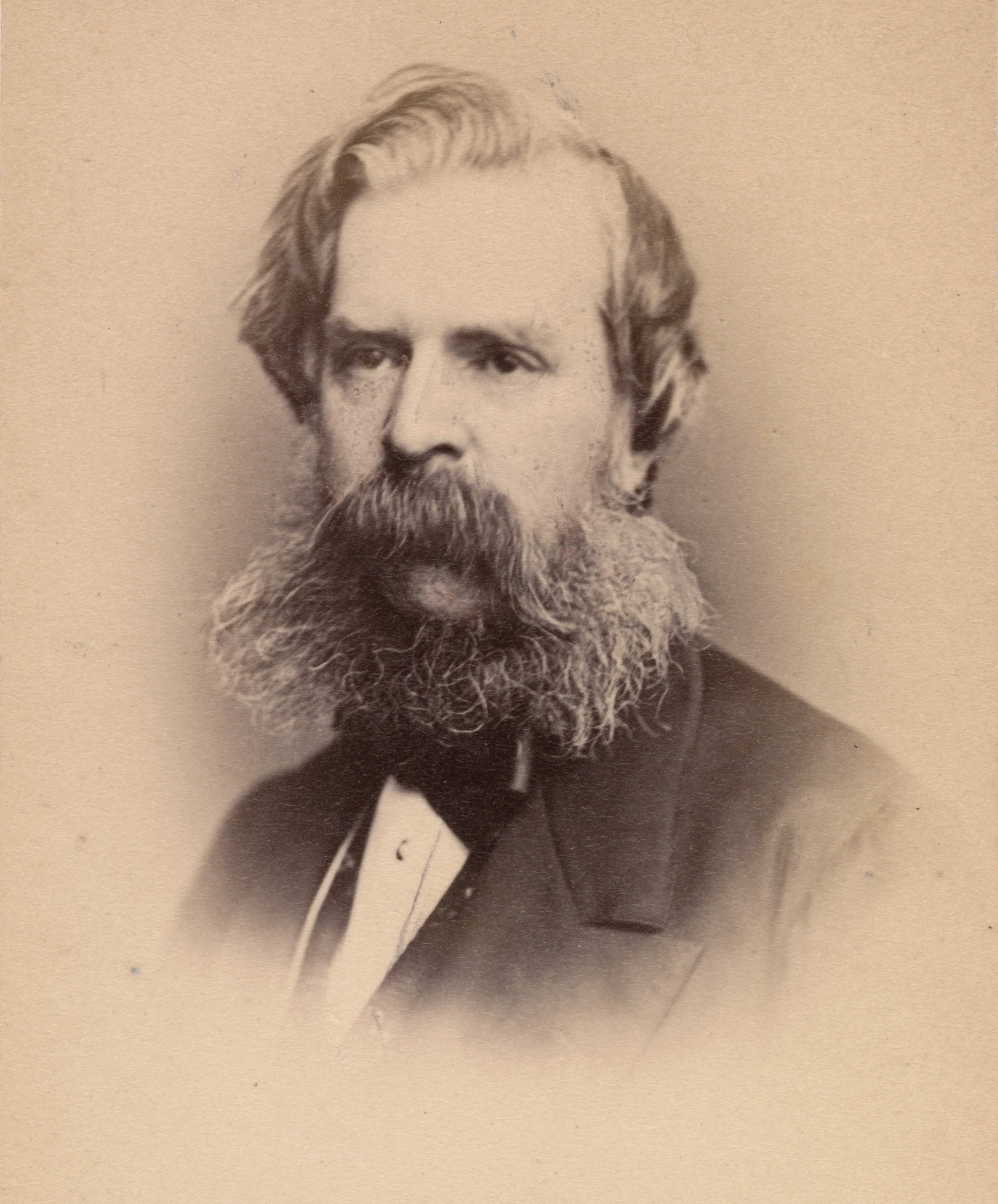 Carte-de-visite; Photographs